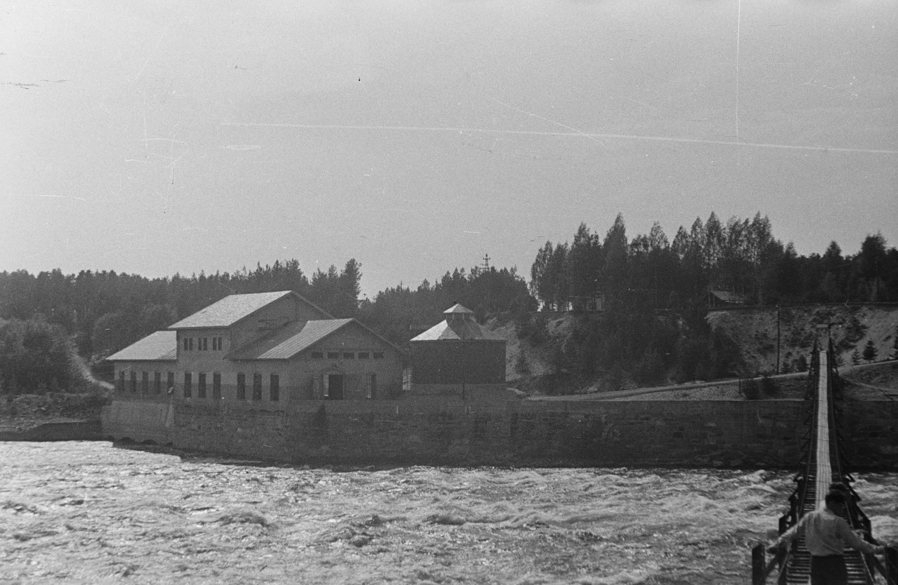 Skjefstadfoss kraftverk 1954. Til høyre i bildet en hengebro for gangtrafikk.